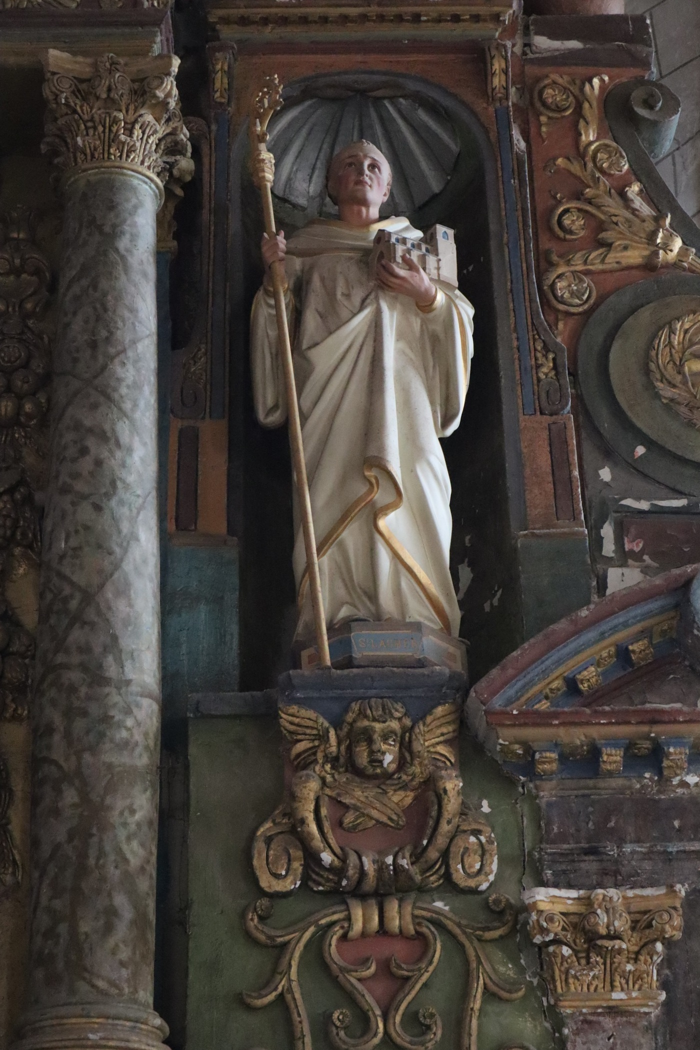 Retable du maître-autel de l'église Notre-Dame du Mont-Harou de Moutiers-au-Perche (61). Statue de Saint-Laumer.